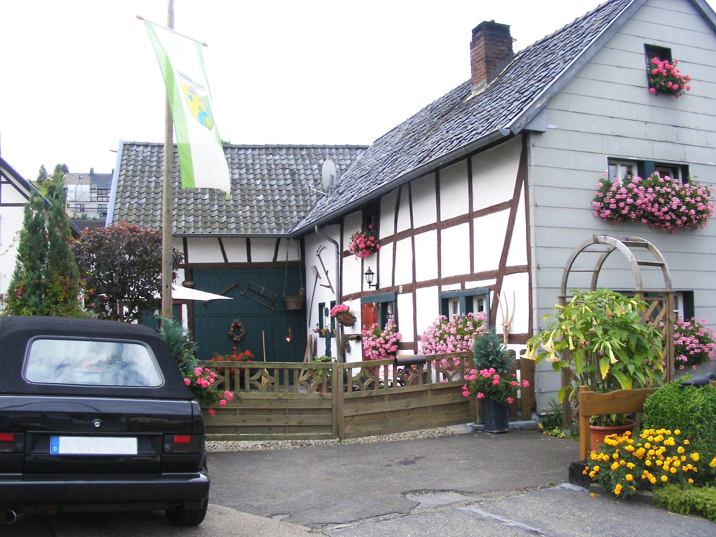 Simmerath Dedenborn Waldstr 4This is a photograph of an architectural monument., no. 129